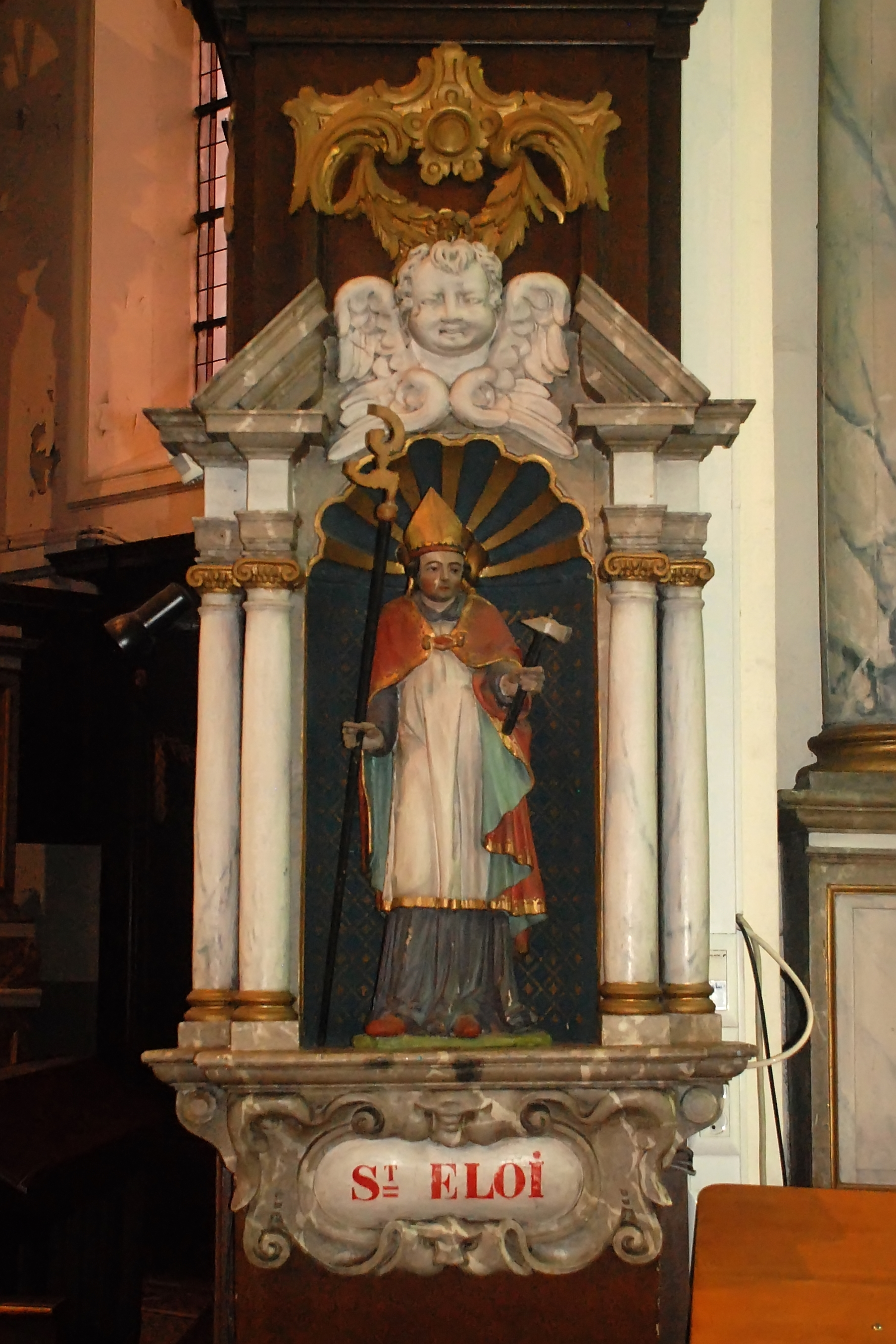 Belgique - Brabant wallon - Église de Court-Saint-Étienne